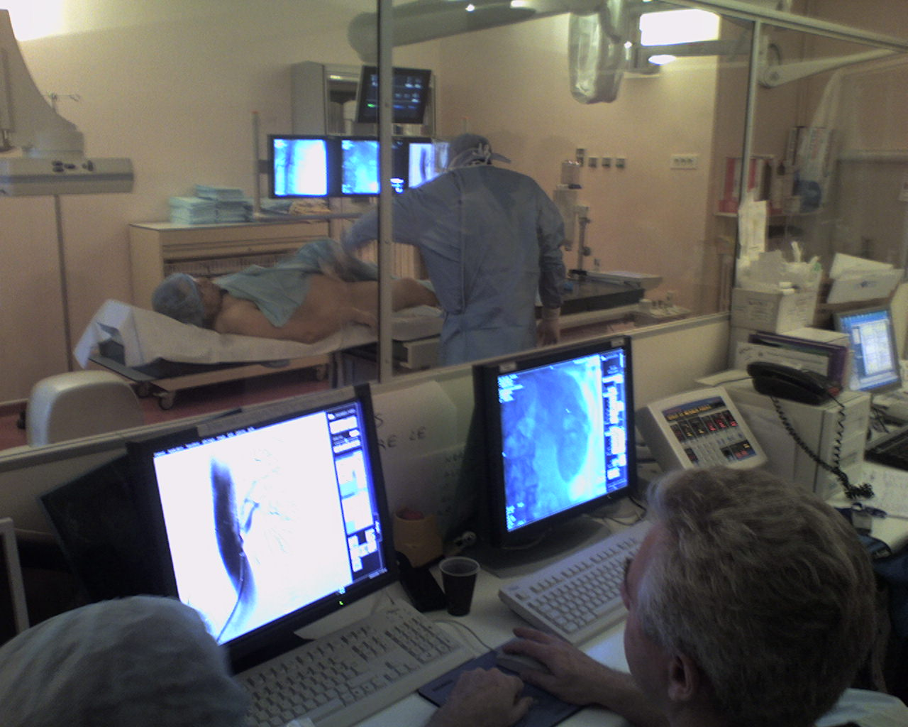 Photographie durant la réalisation d'un examen vasculaire par un médecin radiologue. Auteur et Date : Raziel {boudoir} 25 octobre 2006 à 18:23 (CEST)